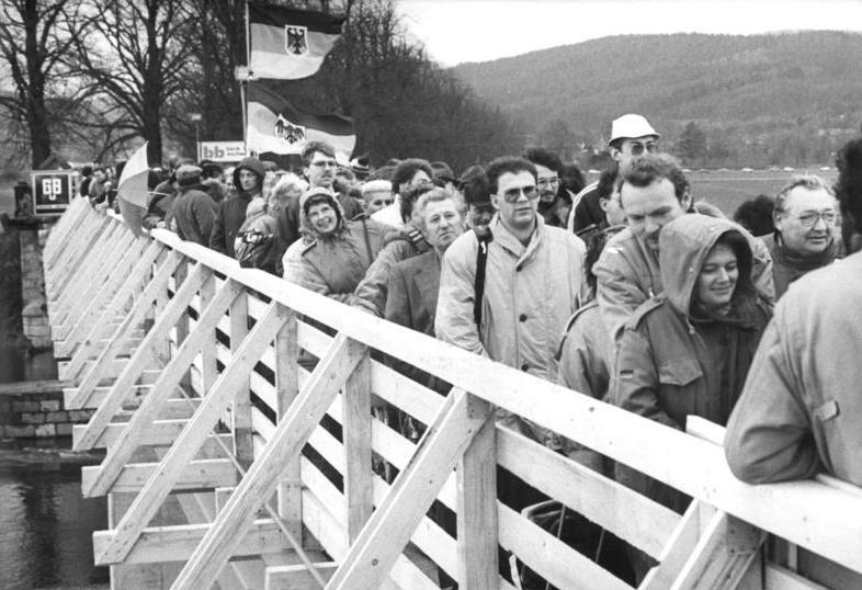 ADN-ZB Ludwig 23.12.89 Bez. Erfurt: Grenzübergänge - einer der drei neuen Grenzübergänge für Fußgänger verbindet wieder die Gemeinde Lauchröden (Kreis Eisenach) und Herleshausen (Hessen). An der Stelle der im zweiten Weltkrieg zerstörten Werrabrücke wurde von einer hessischen Baufirma innerhalb einer Woche ein behelfsmäßiges Bauwerk errichte. Besucher aus Hessen auf dem Weg nach Lauchröden in Thüringen.